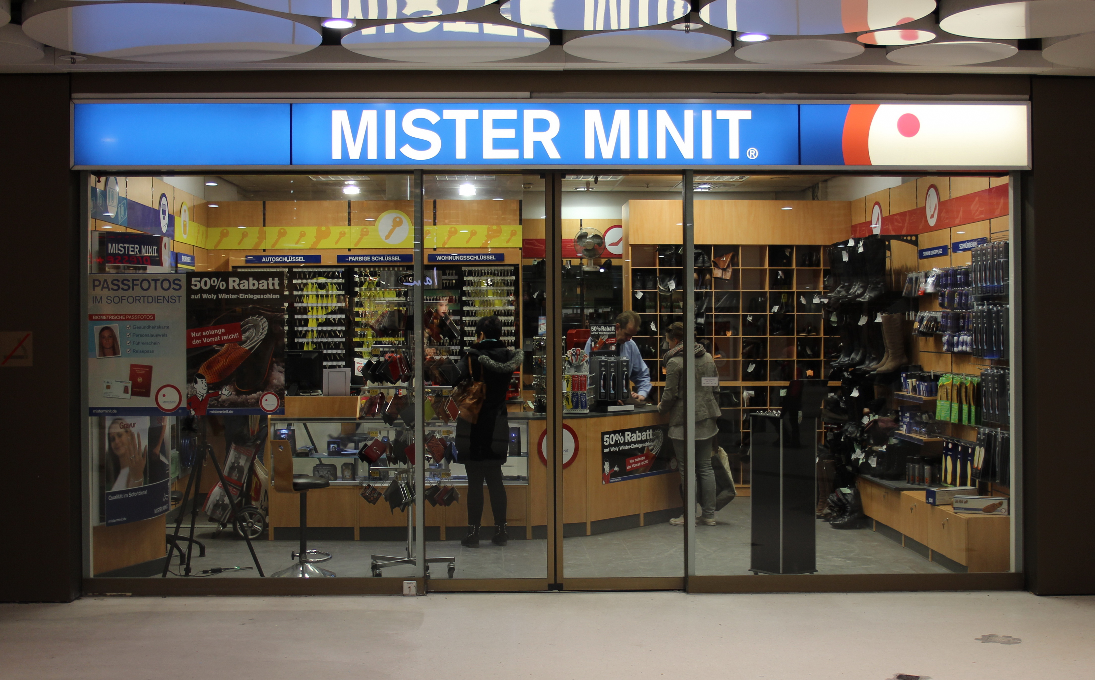 MISTER MINIT im Untergeschoss des Münchner Stachus (Karlsplatz)